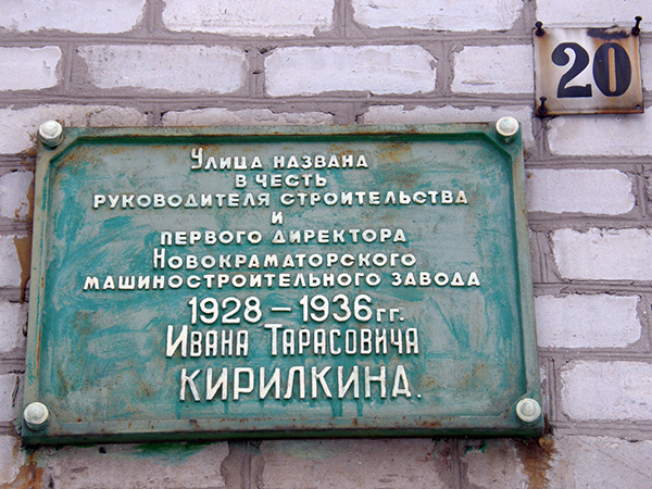 Краматорск